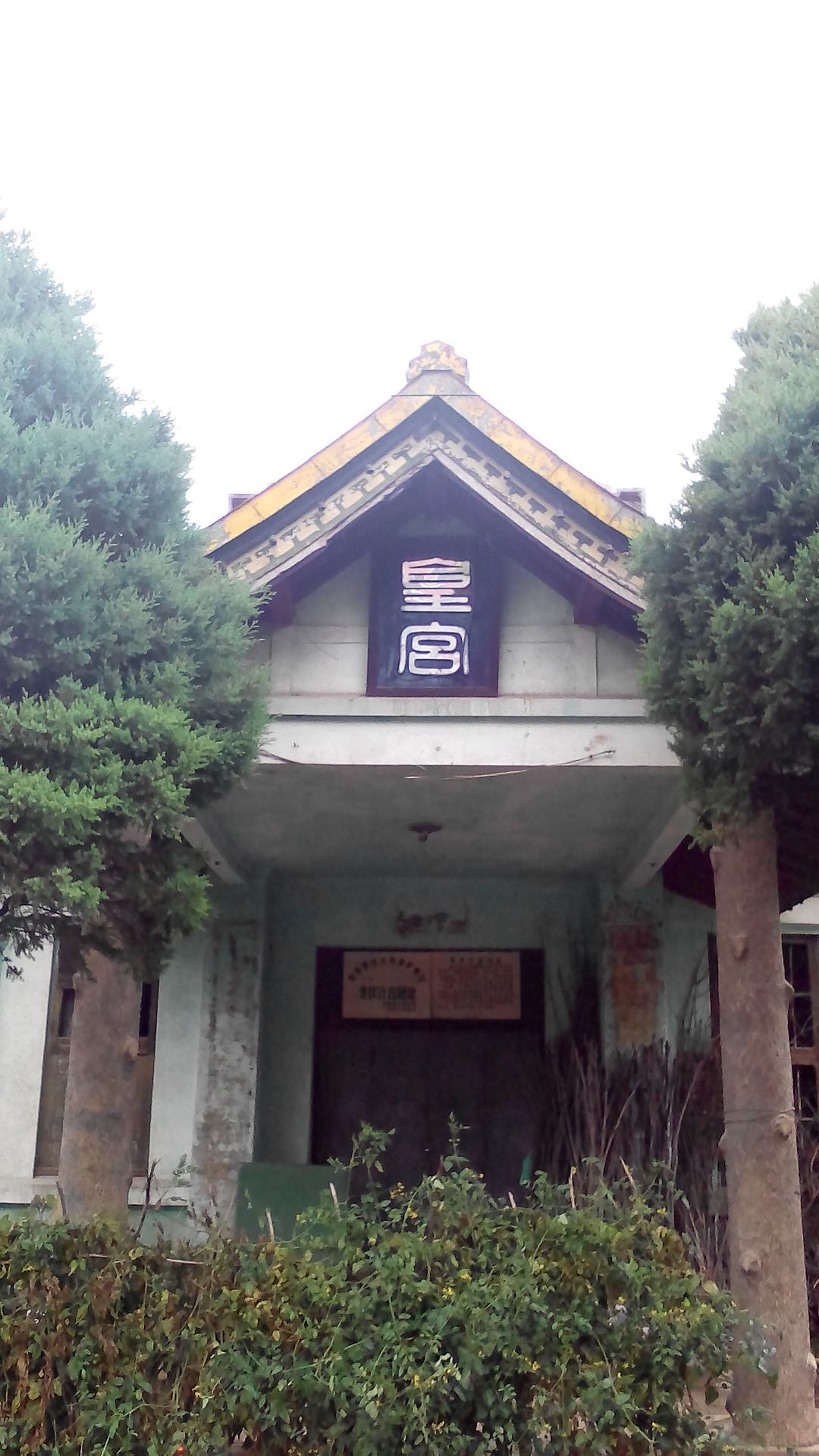 中文（中国大陆）: 青城子镇溥仪行宫